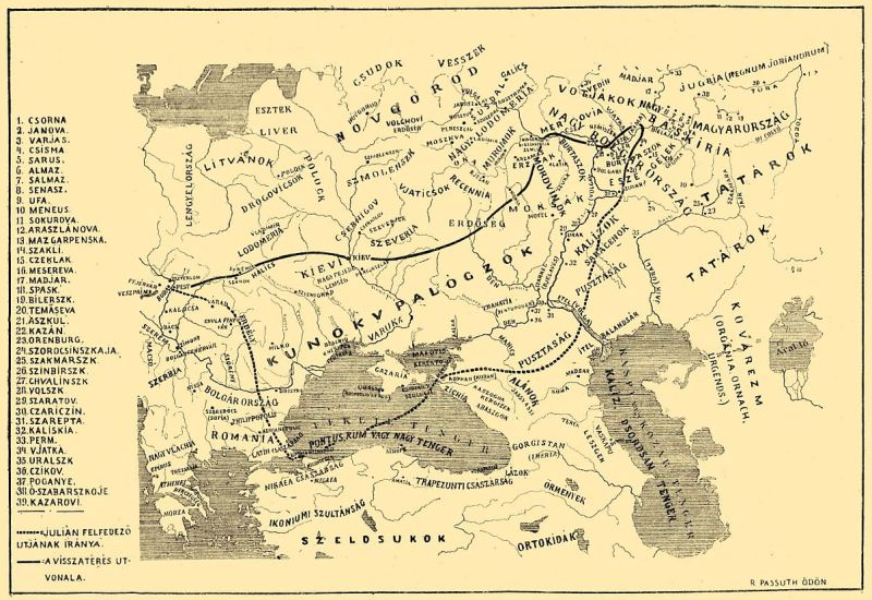 Juliánus barát útjának térképe